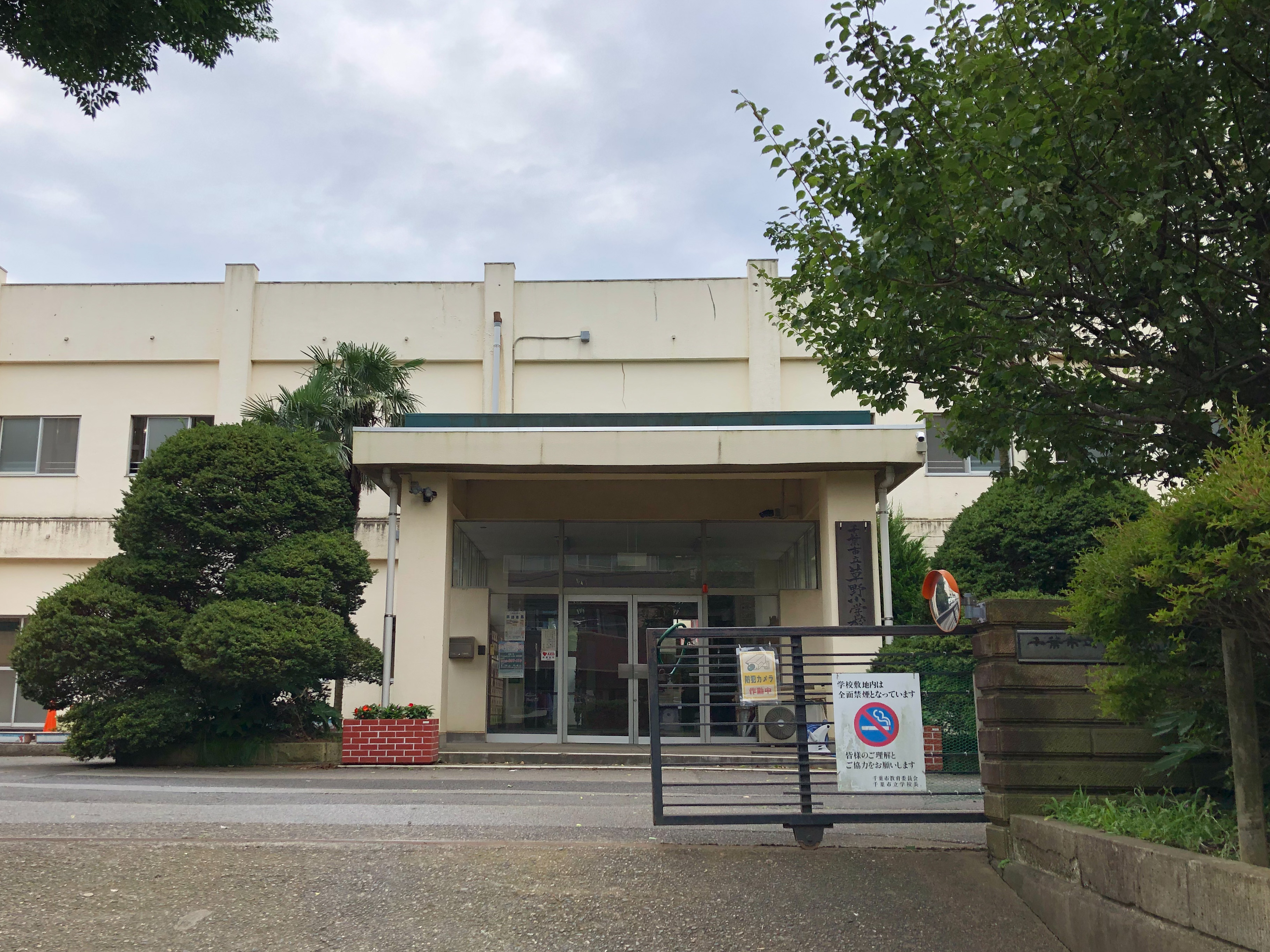 千葉市立草野小学校の校舎の写真